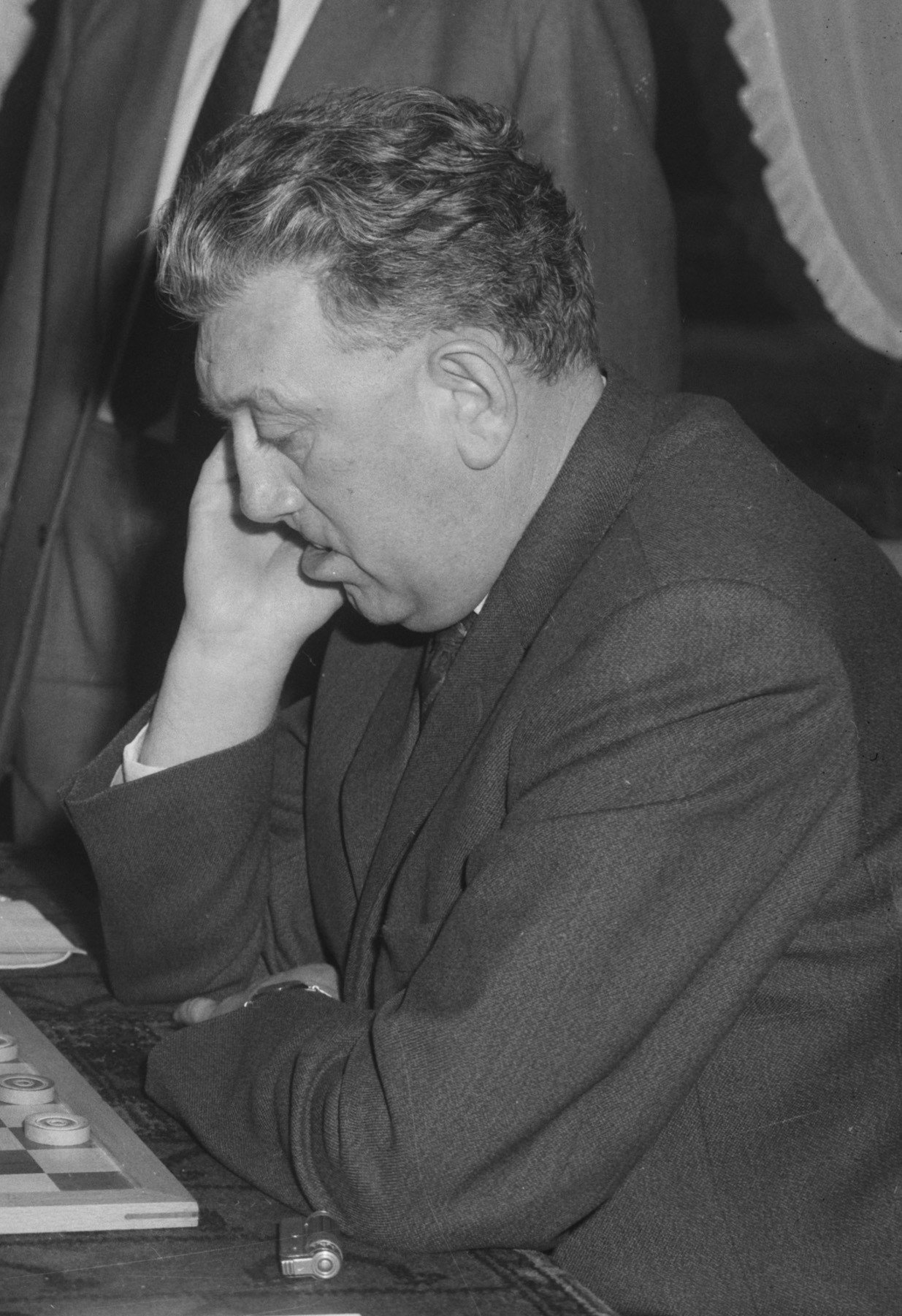 Persoonlijke kampioenschap van Nederland dammen te Apeldoorn J. M. Bom (links) en H. Laros